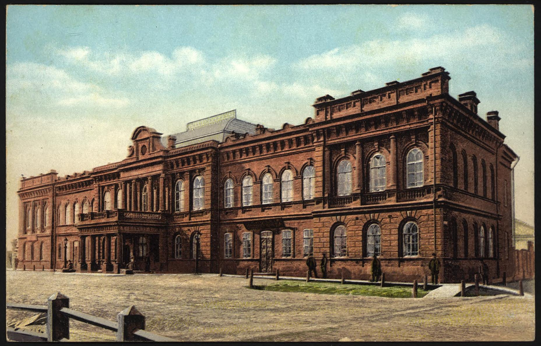 Городская управа г Иркутск В А Рассушин